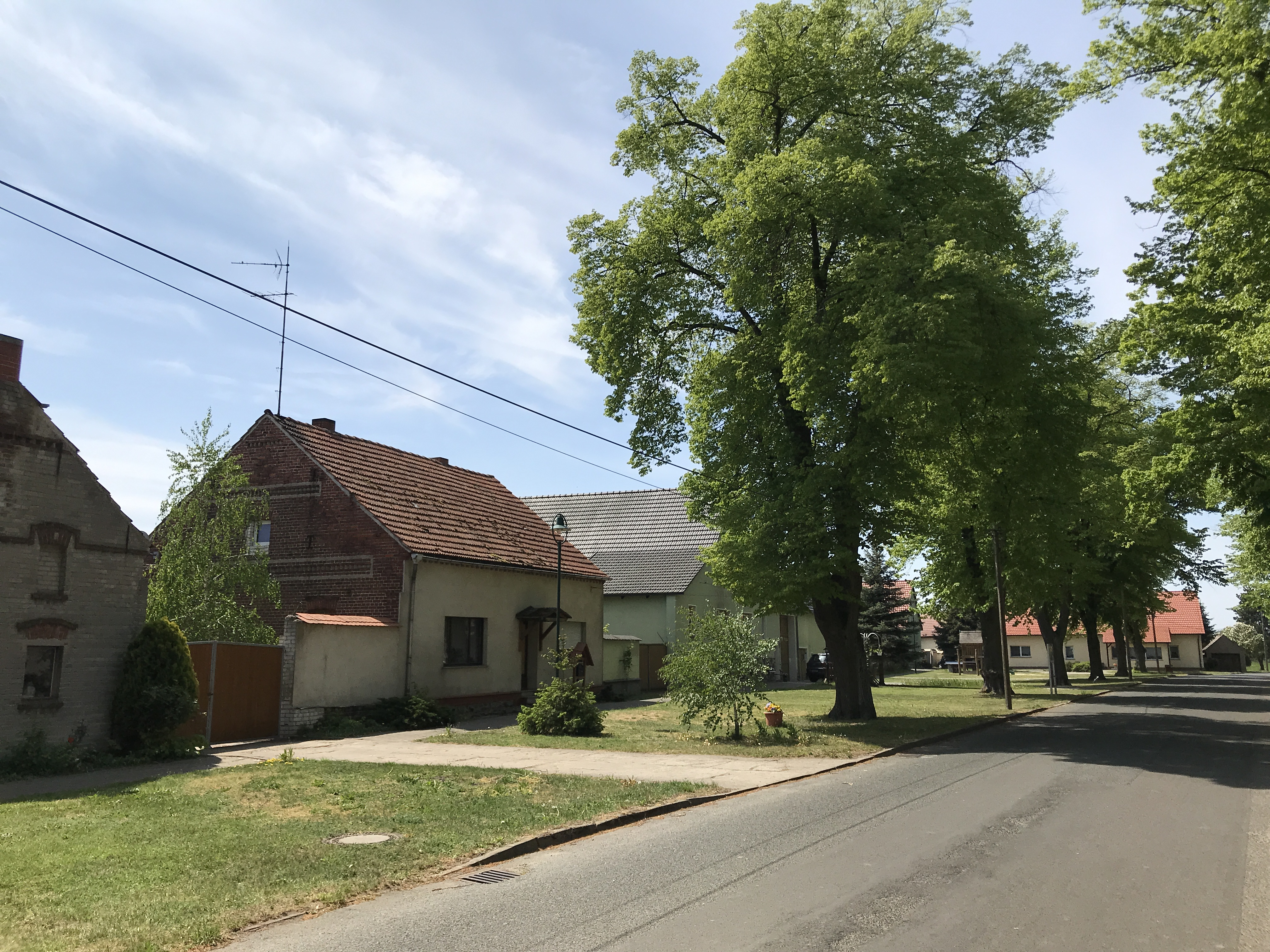 Rinow ist ein Ortsteil der Gemeinde Niederer Fläming im Süden des Landkreises Teltow-Fläming in Brandenburg.